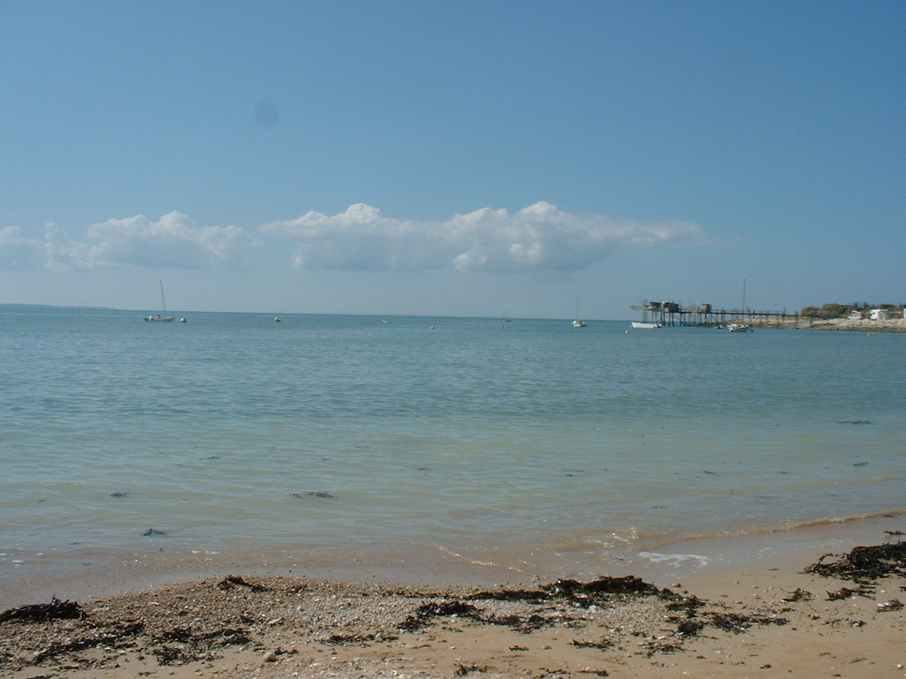 la plage d'Angoulins (17), 2003